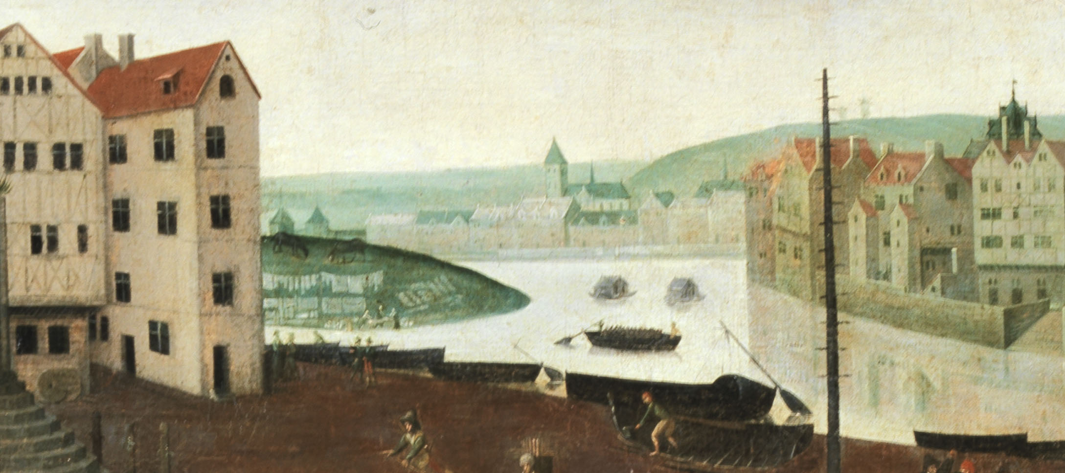 Détail du tableau « La procession de la Ligue sur la place de Grève, en 1590 ou 1593 ».